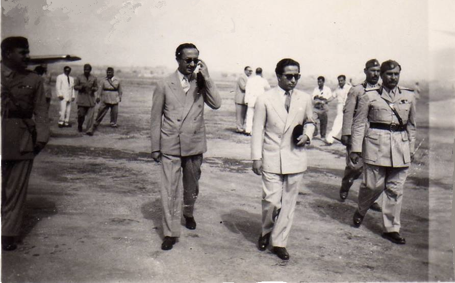 الملك فيصل الثاني وعبد الاله في مطار الموصل 1957 مع رفيق عارف رئيس اركان الجيش علئ يمين الصورة وخليل جاسم الدباغ آمر موقع الموصل على يسارها